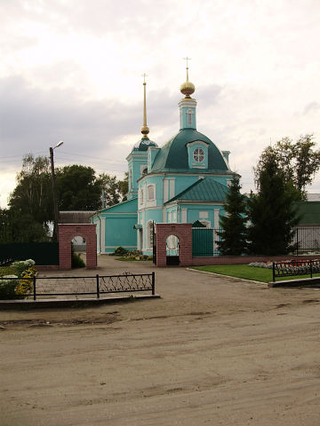 Церковь Троицы Живоначальной в городе Шацке